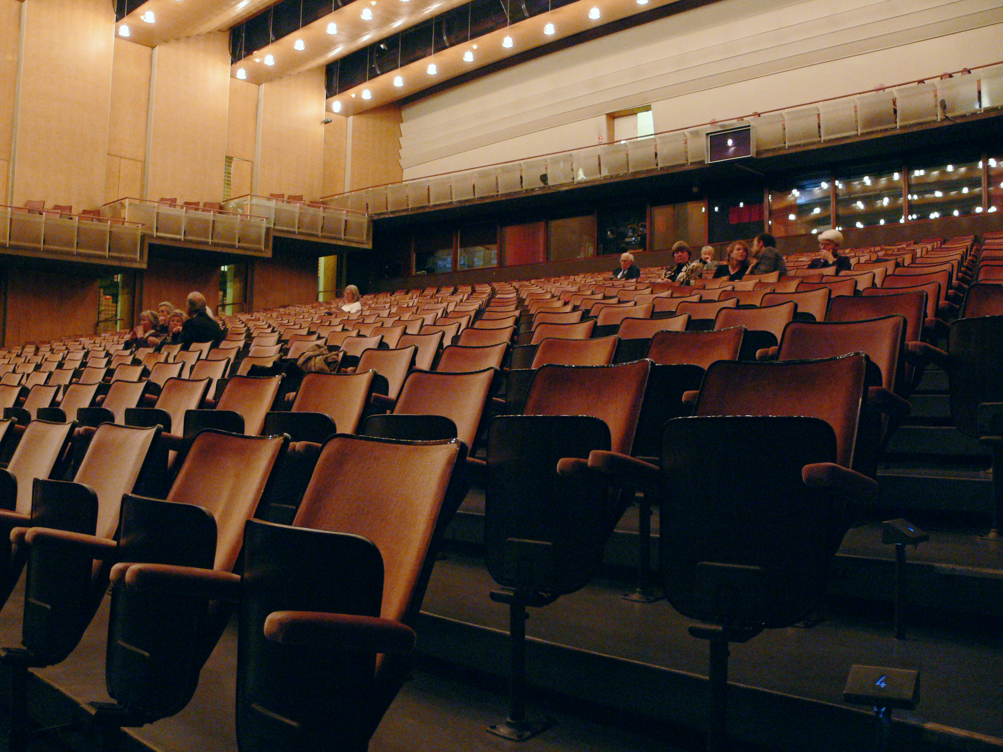 Nationaltheater Mannheim, Zuschauerraum des Opernhauses